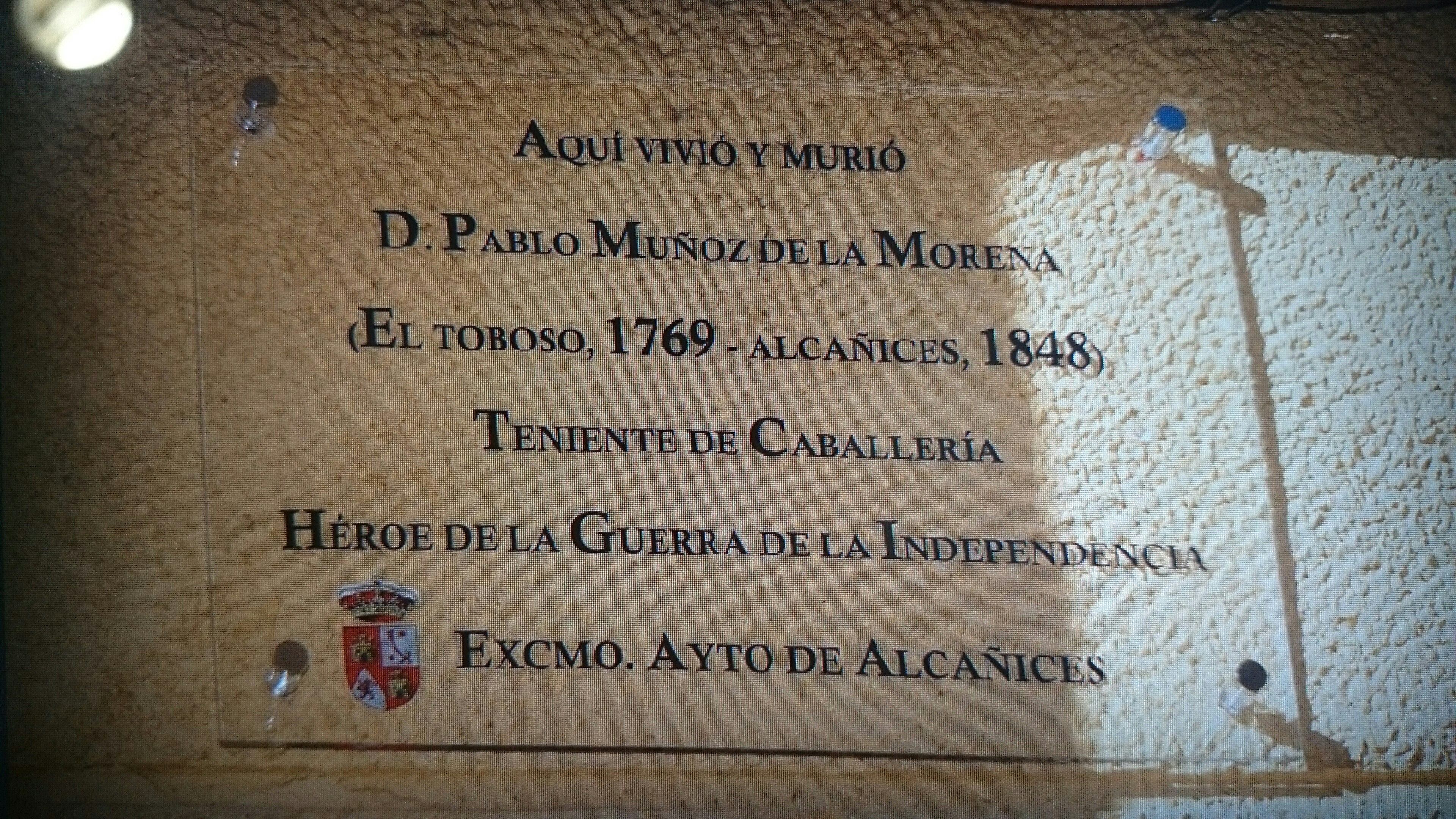 Placa dedicada en Alcañices (Zamora) a Pablo Muñoz de la Morena, en la casa donde vivió y murió